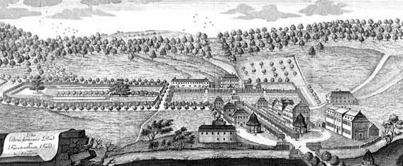 Kupferstich von der Badanlage des Staatsbades Brückenau